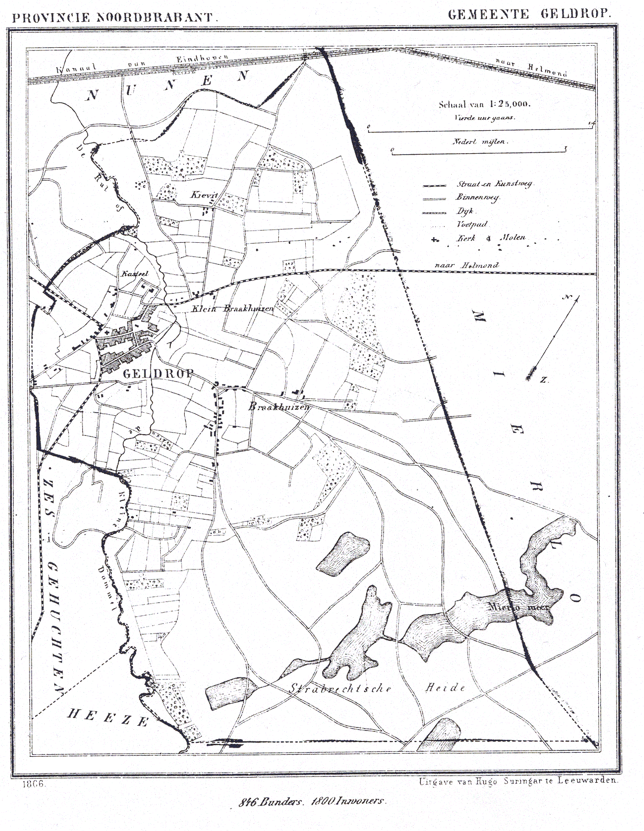 Nederland, Noord-Brabant, Gemeente Geldrop